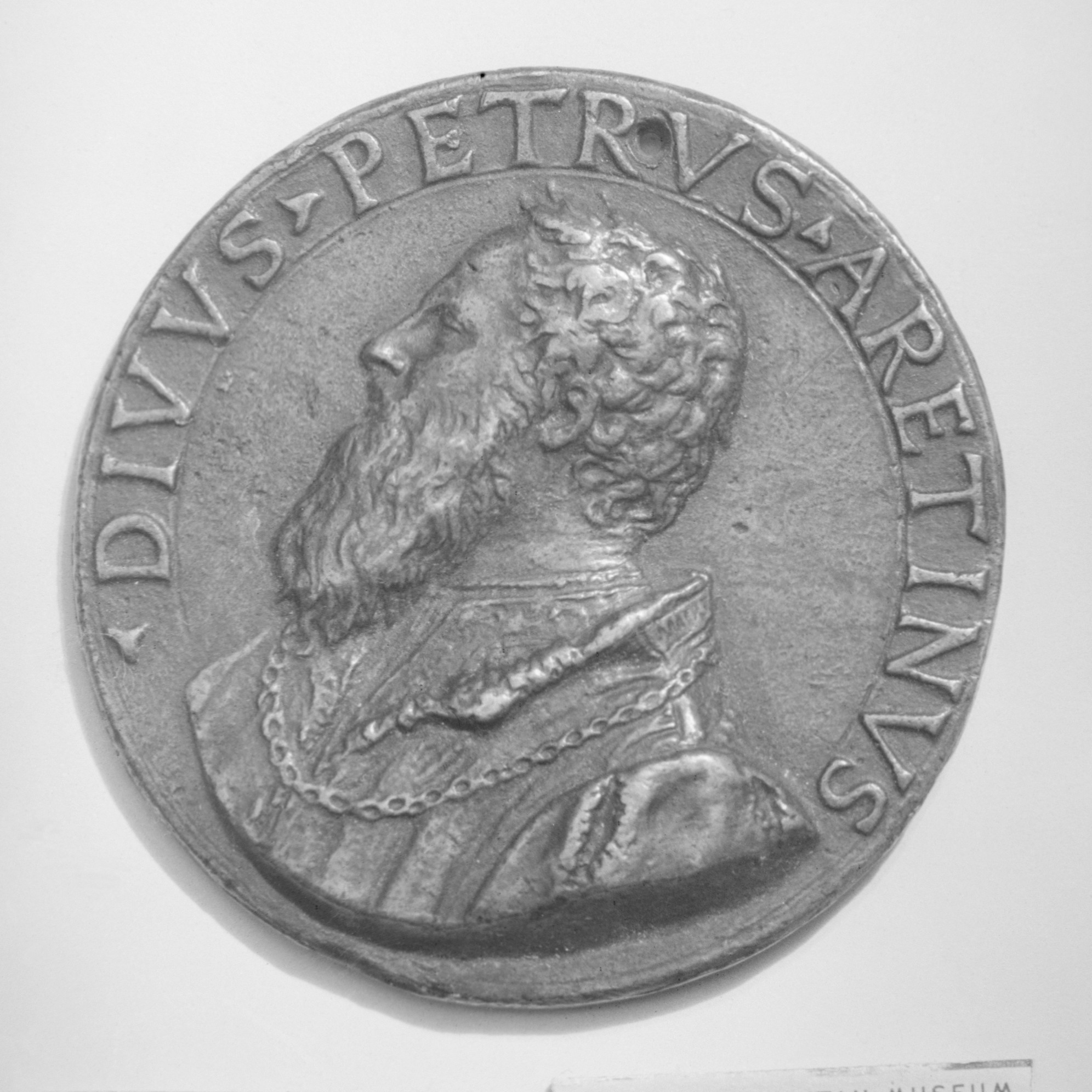 Italian; Medal; Medals and Plaquettes